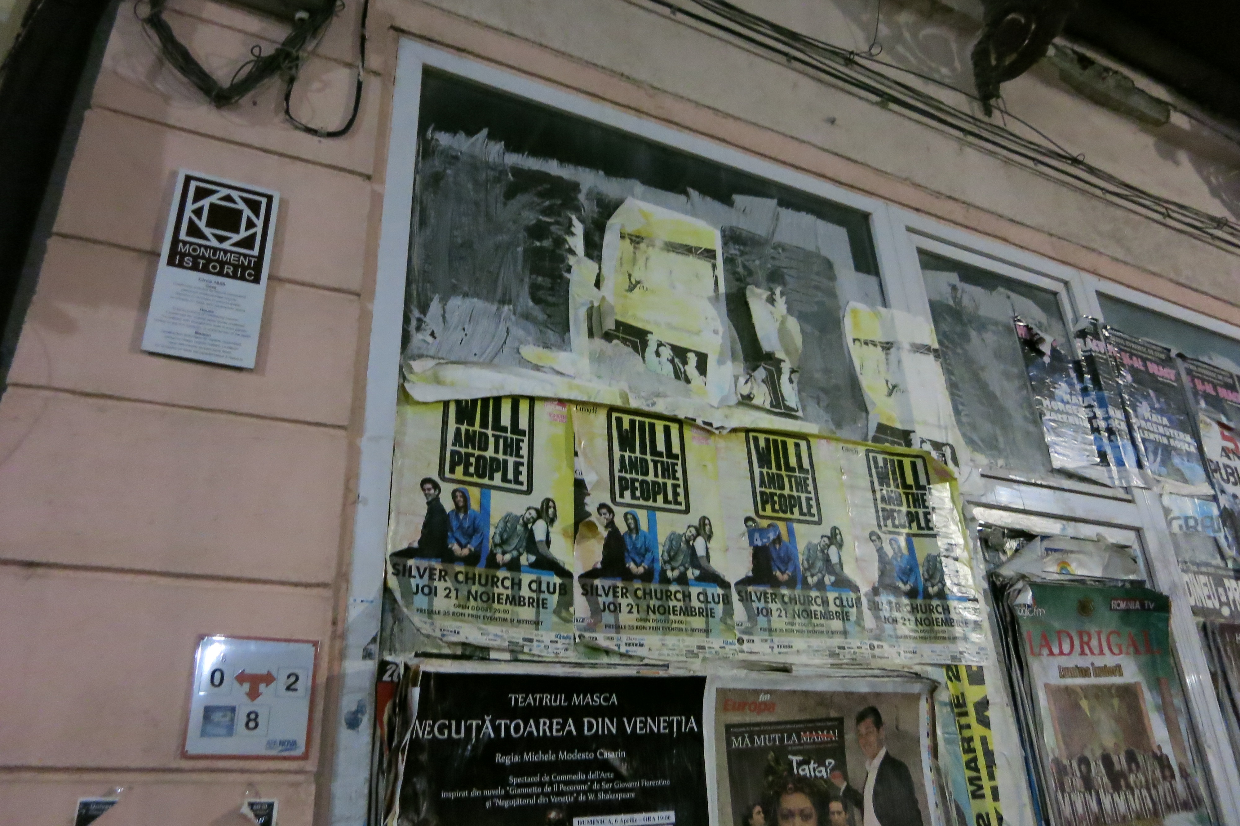 Casă municipiul București Str. Franceză sector 3 sf. sec. XIX